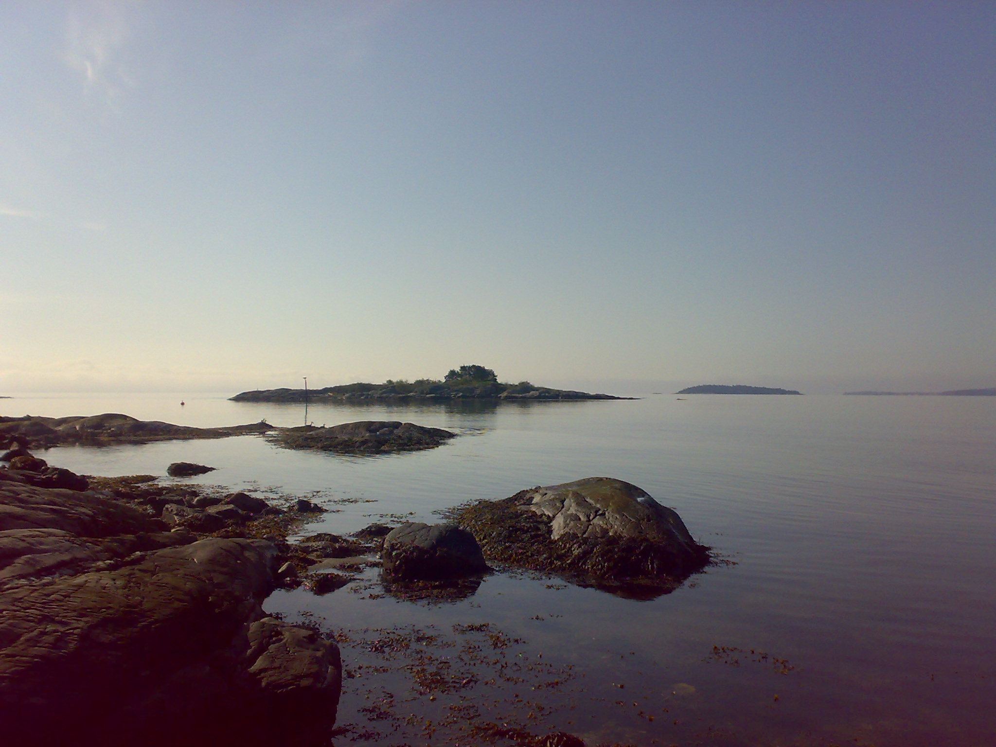 Ertsvikskjær naturreservat